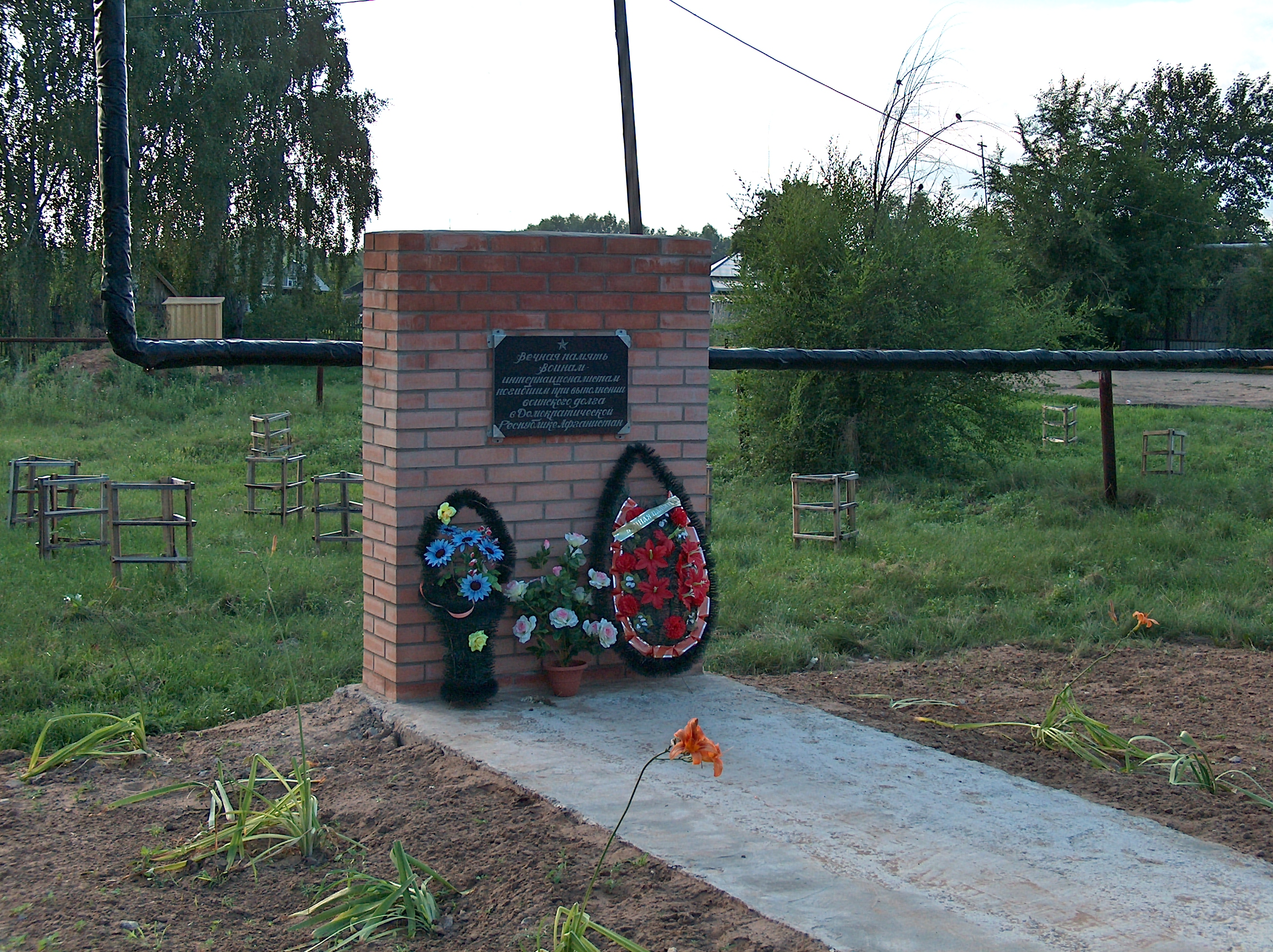 Памятник в селе Утёвка воинам-интернационалистам, погибшим в Афганистане